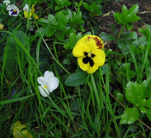 Pensée Date : 2004:06:05 15:07:21 Localisation : Quaregnon - Hainaut - Belgique Photographe : Moosh 13 jun 2004 à 10:20 (CEST) Droits : libre